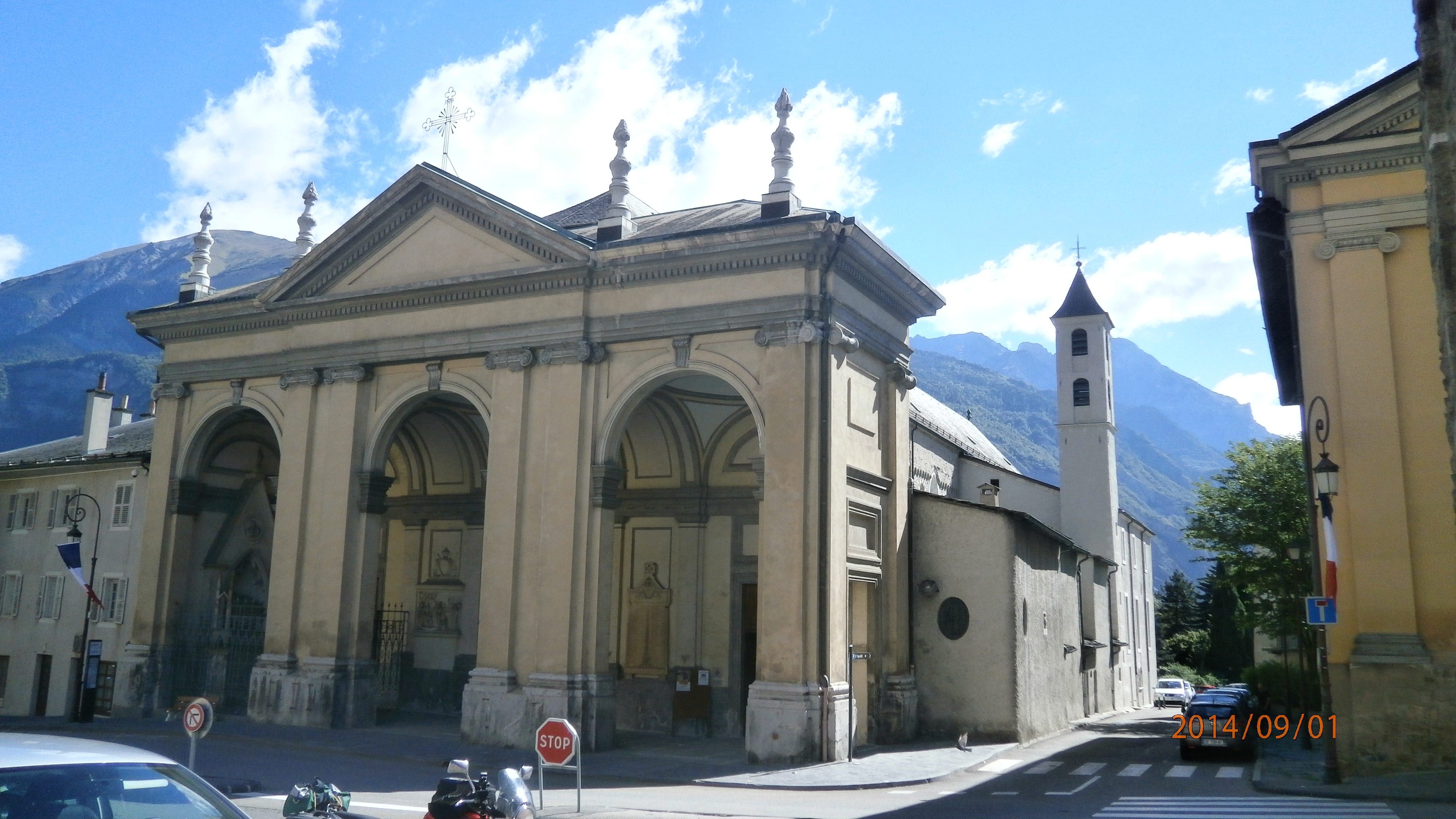 Cathédrale Saint-Jean-Baptiste de Saint-Jean-de-Maurienne